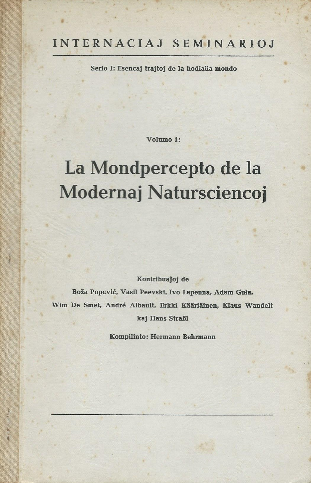 kovrilo de "La Mondpercepto de la Modernaj Natursciencoj", 1967